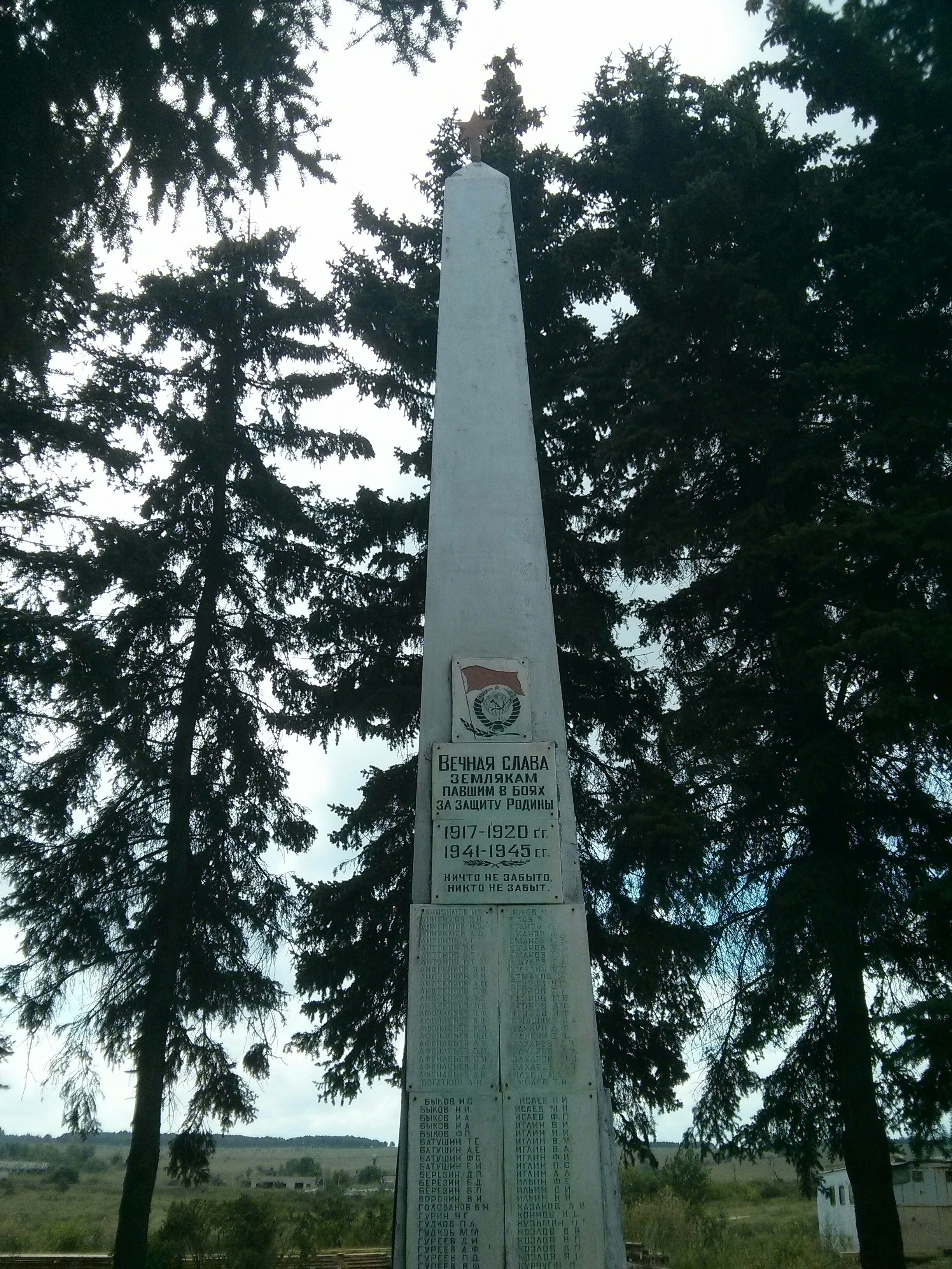 Обелиск "Вечная слава землякам павшим в боях за защиту Родины 1917-1921 г.г. 1941-1945 г.г. Ничто не забыто. Никто не забыт."